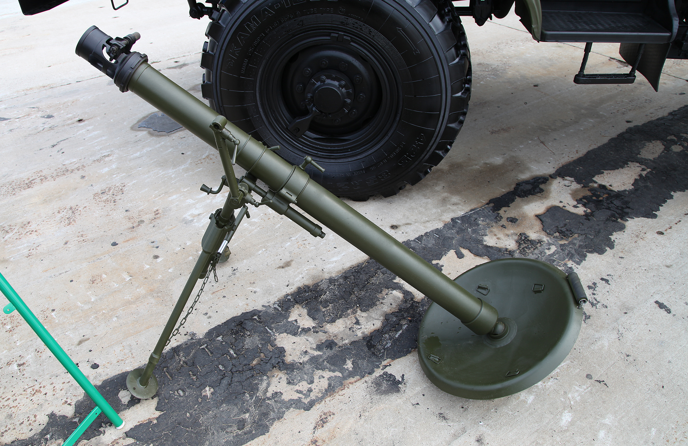 82-мм миномет 2Б14 Поднос (82mm mortar 2B14 Podnos)